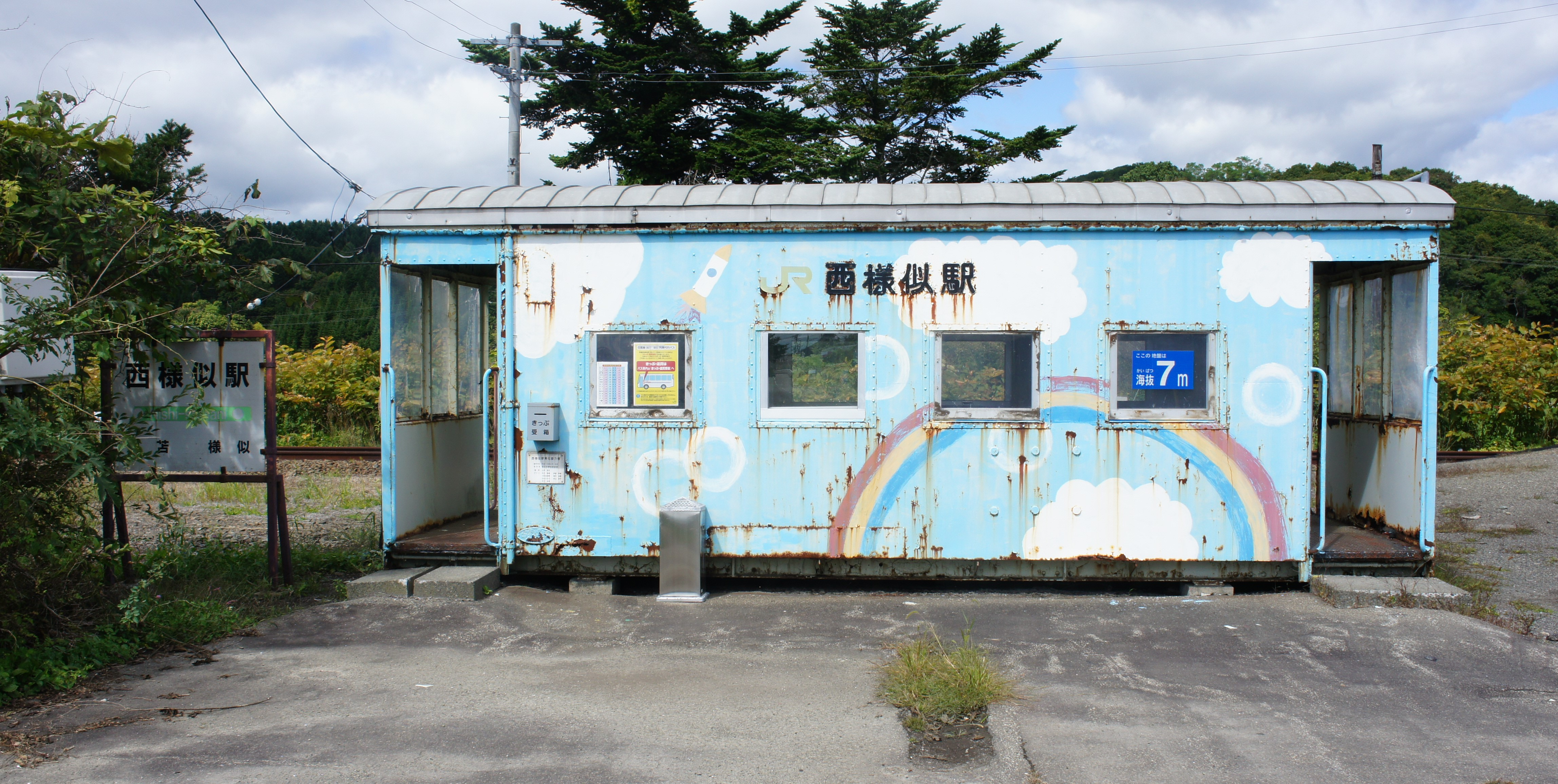 JR日高本線・西様似駅の駅舎 Sony NEX-3